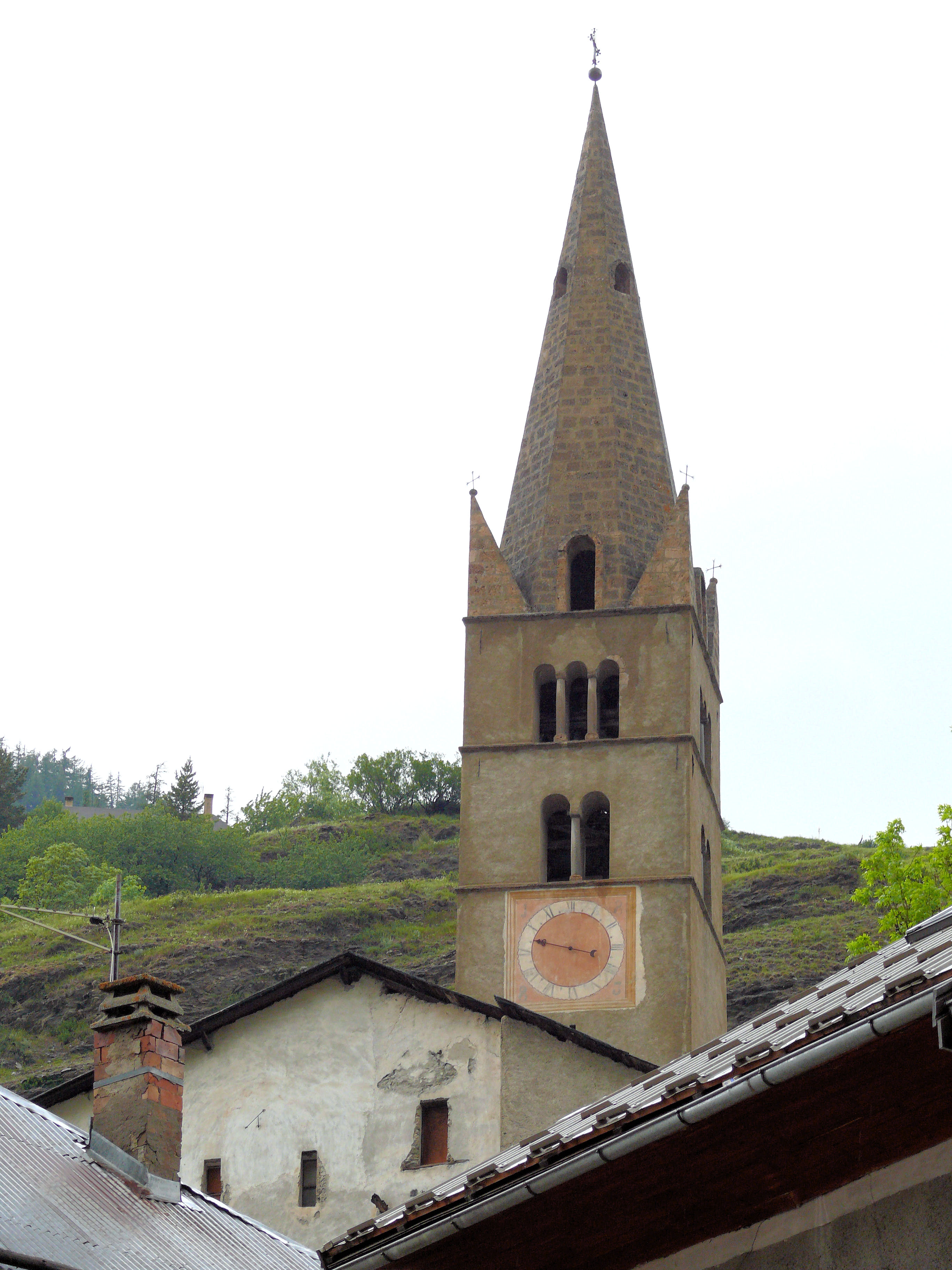 Aiguilles - Clocher de l'église Saint-Jean-Baptiste